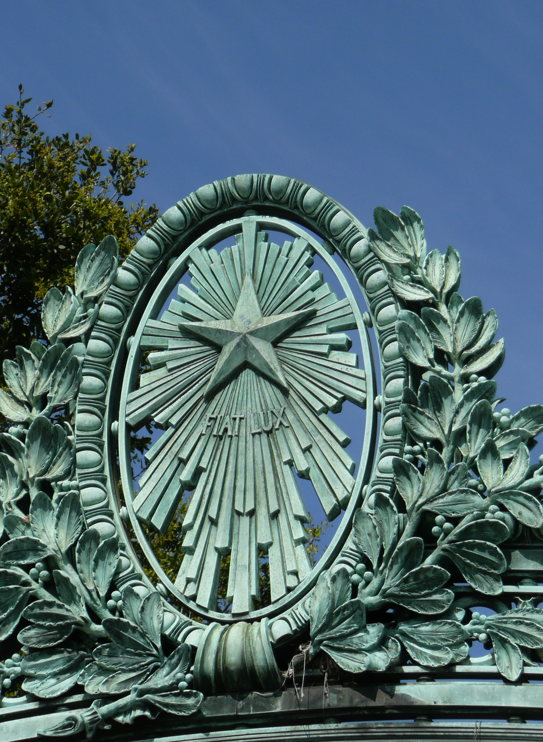 Fiat Lux, Sather Gate detail